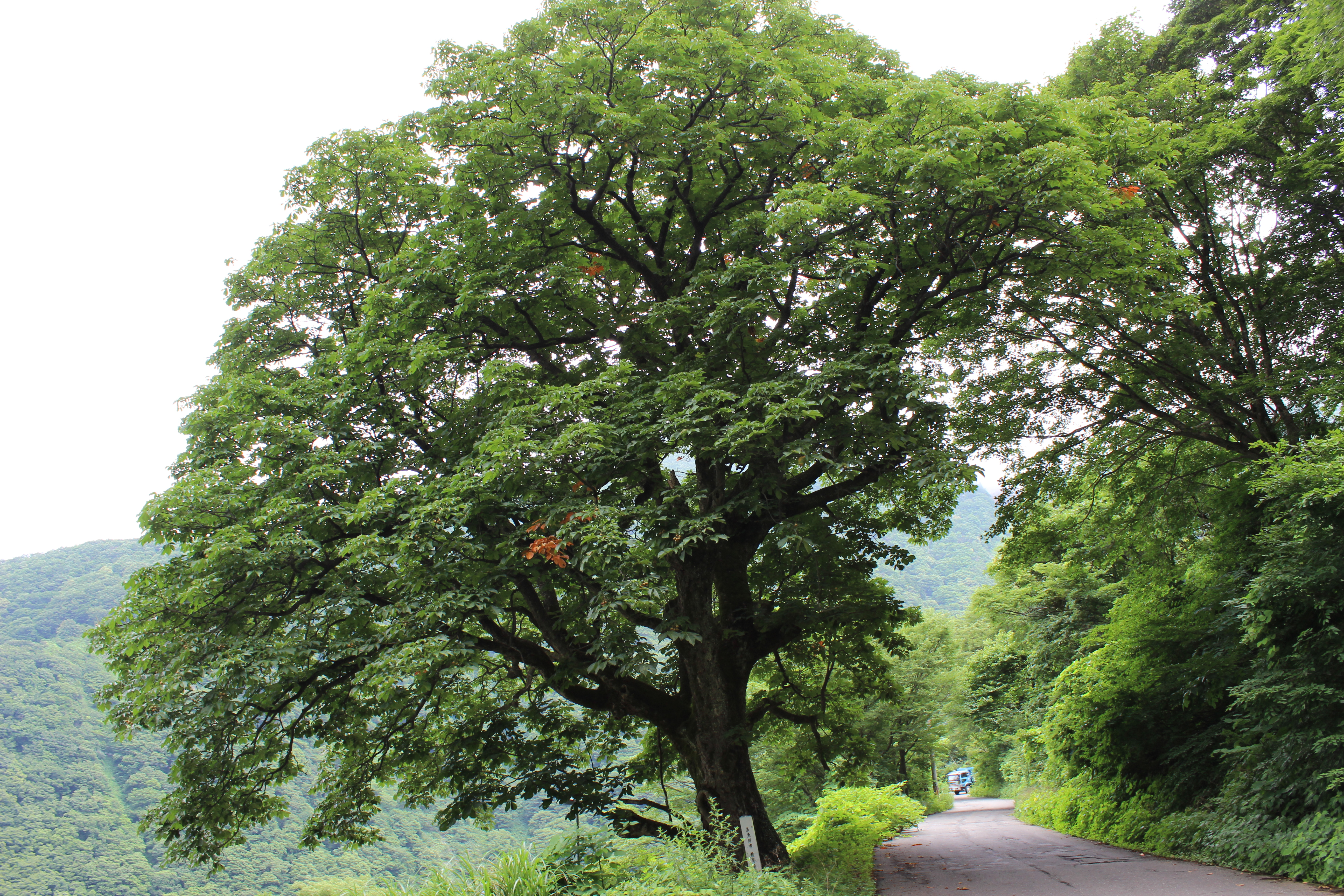 ボッカトチノキ。新潟県糸魚川市大所。